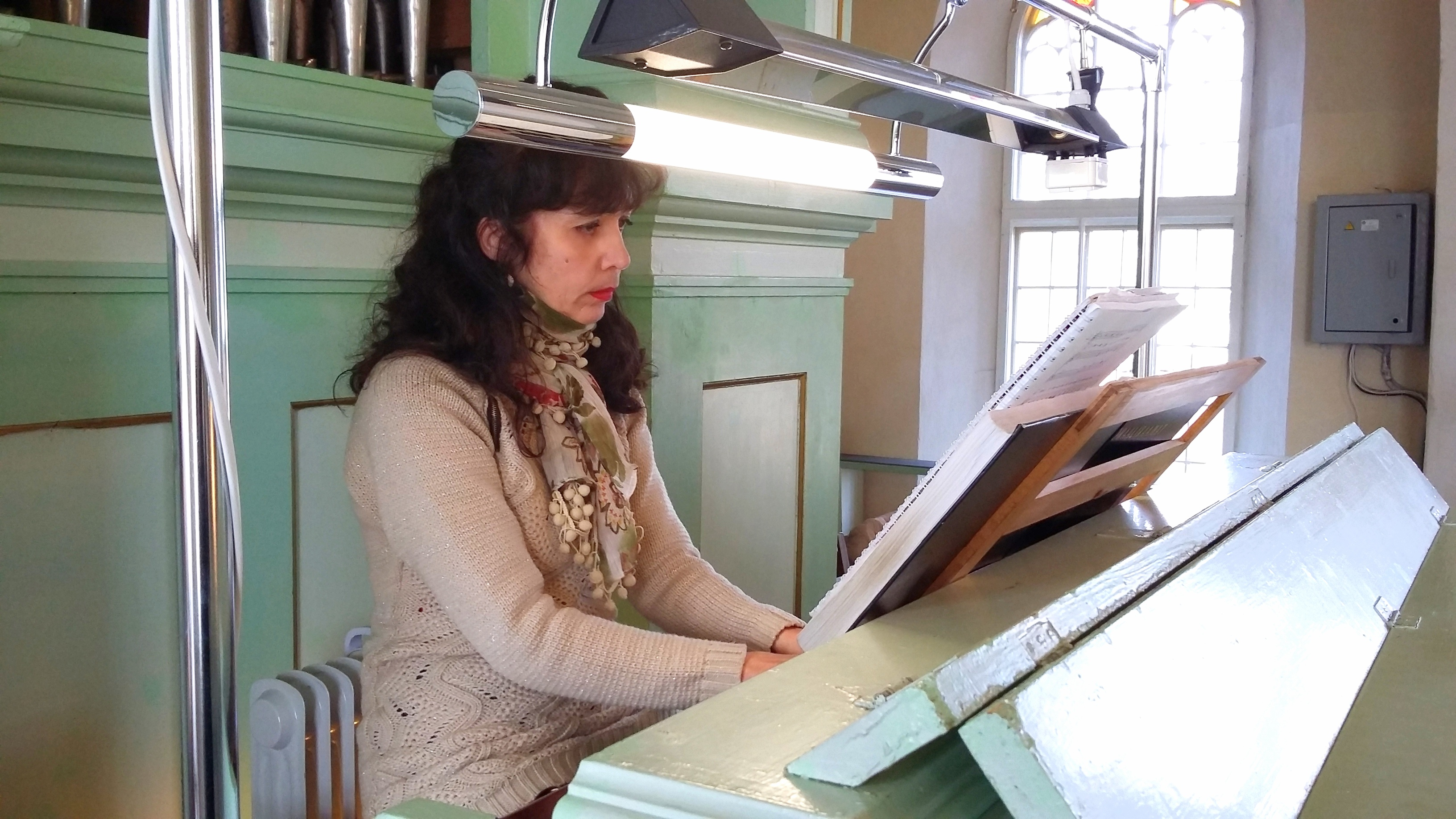 Anneli Merelaid mängimas külalisorganistina teenistusel Hageri kirikus